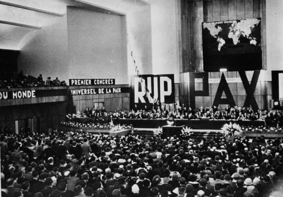 Vue générale du Congrès universel pour la paix au stade du Heysel à Bruxelles en 1936.